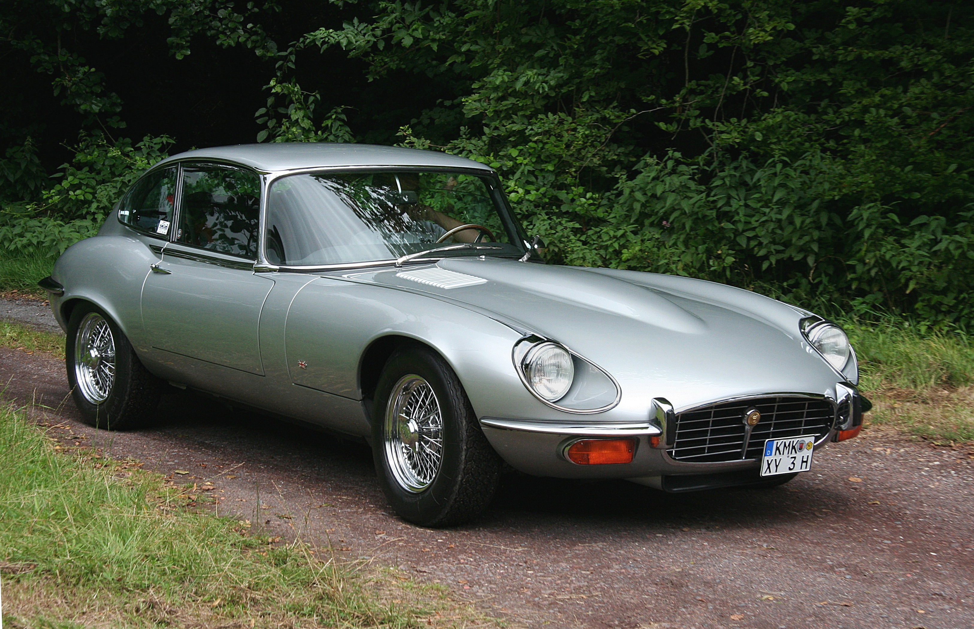 Jaguar E-Type mit V12-Motor, Baujahr 1972